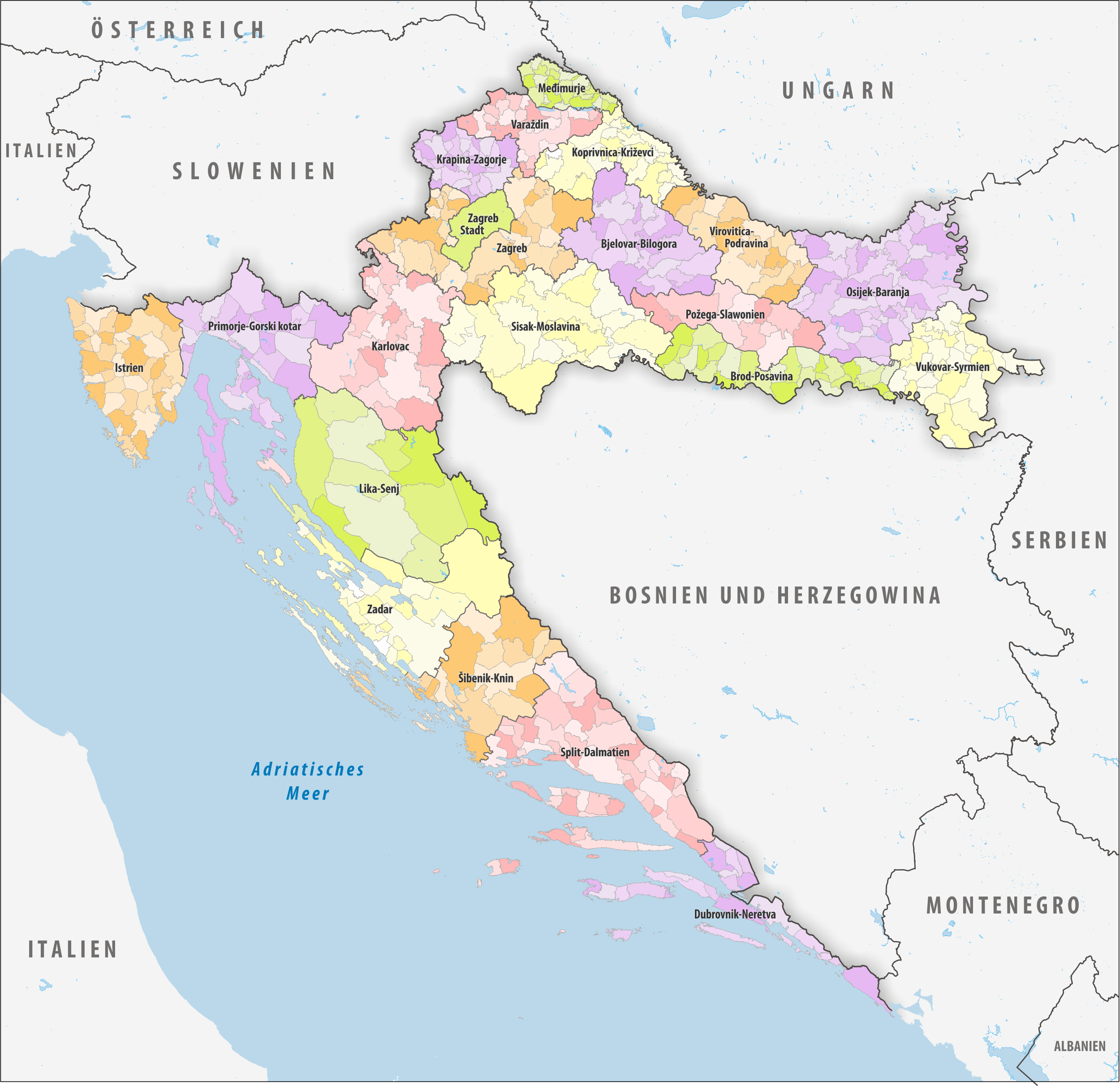 Politische Gliederung Kroatiens